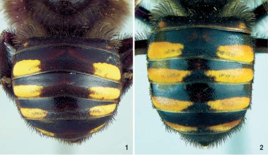 Subespecies de M.quadrifasciata, 1) Melipona quadrifasciata anthidioides 2) Melipona quadrifasciata quadrifasciata